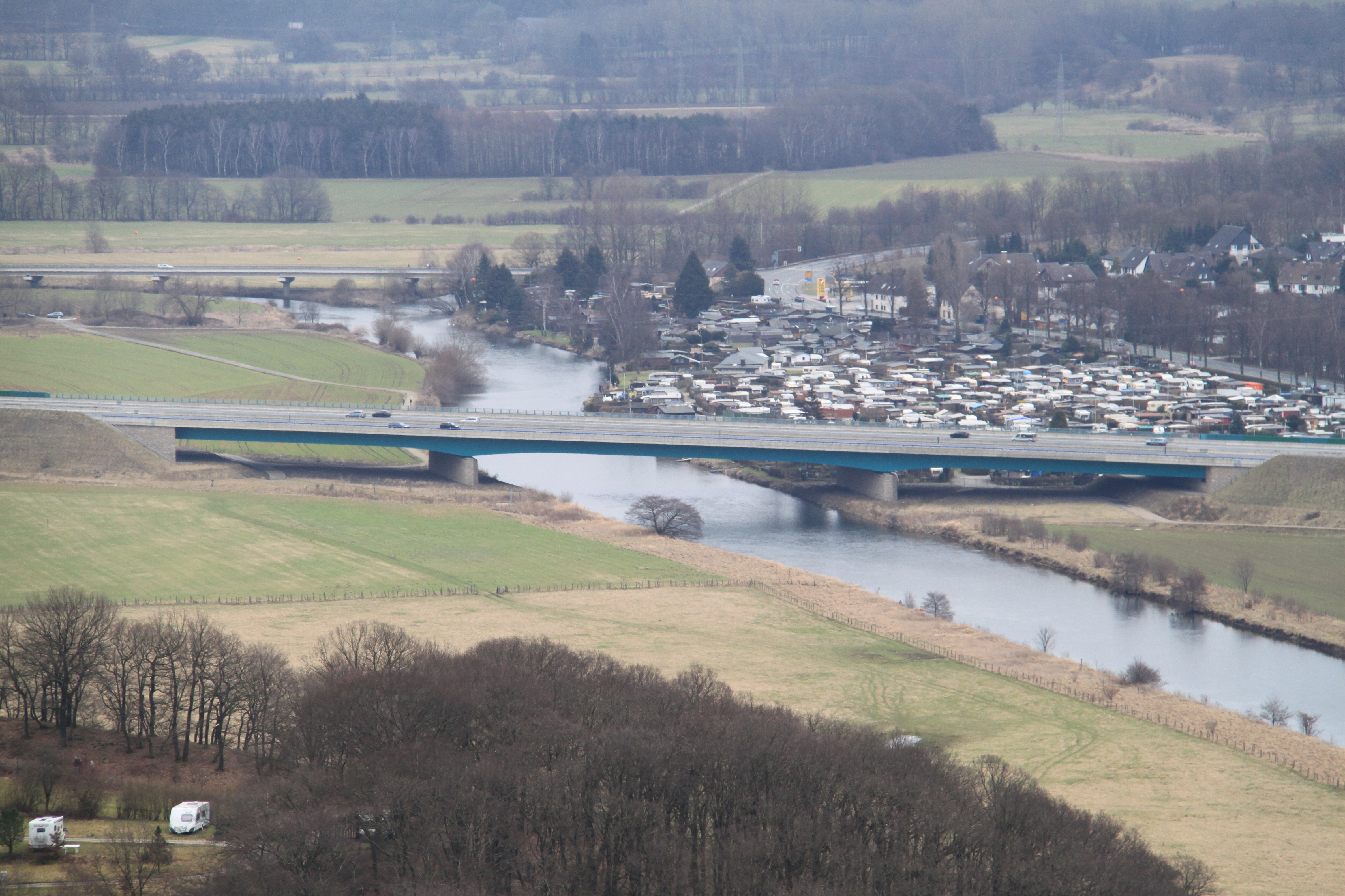 Impressionen Tour Syberg, Autobahnbrücke A1, Campingplatz Hagen-Garenfeld; links vor der Brücke das Hagener Naturschutzgebiet „Ruhraue Syburg“